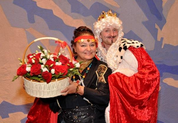 Bondarchuk in 2012